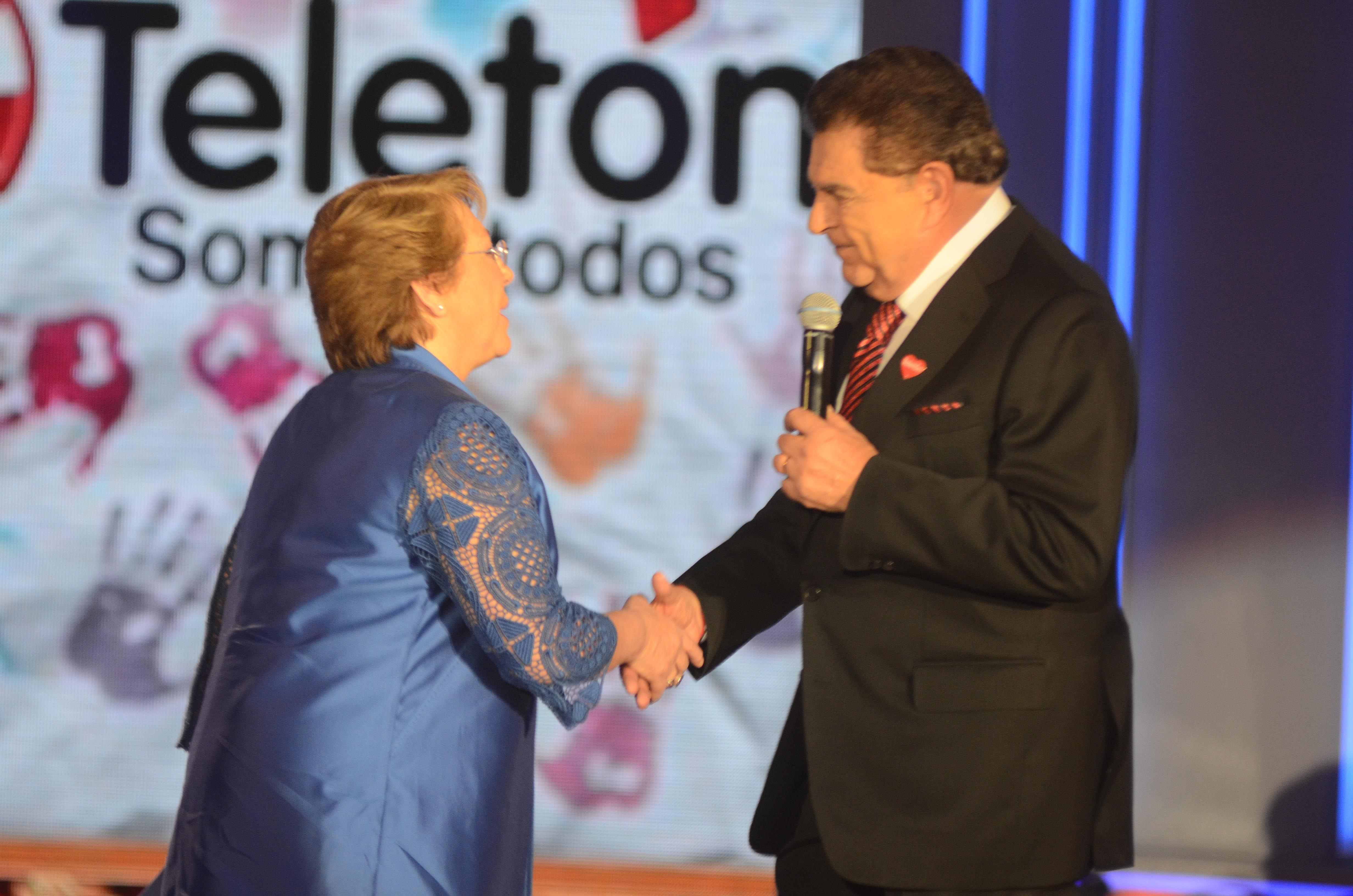 Ministro Elizalde asiste a la Ceremonia Inaugural de la Teletón